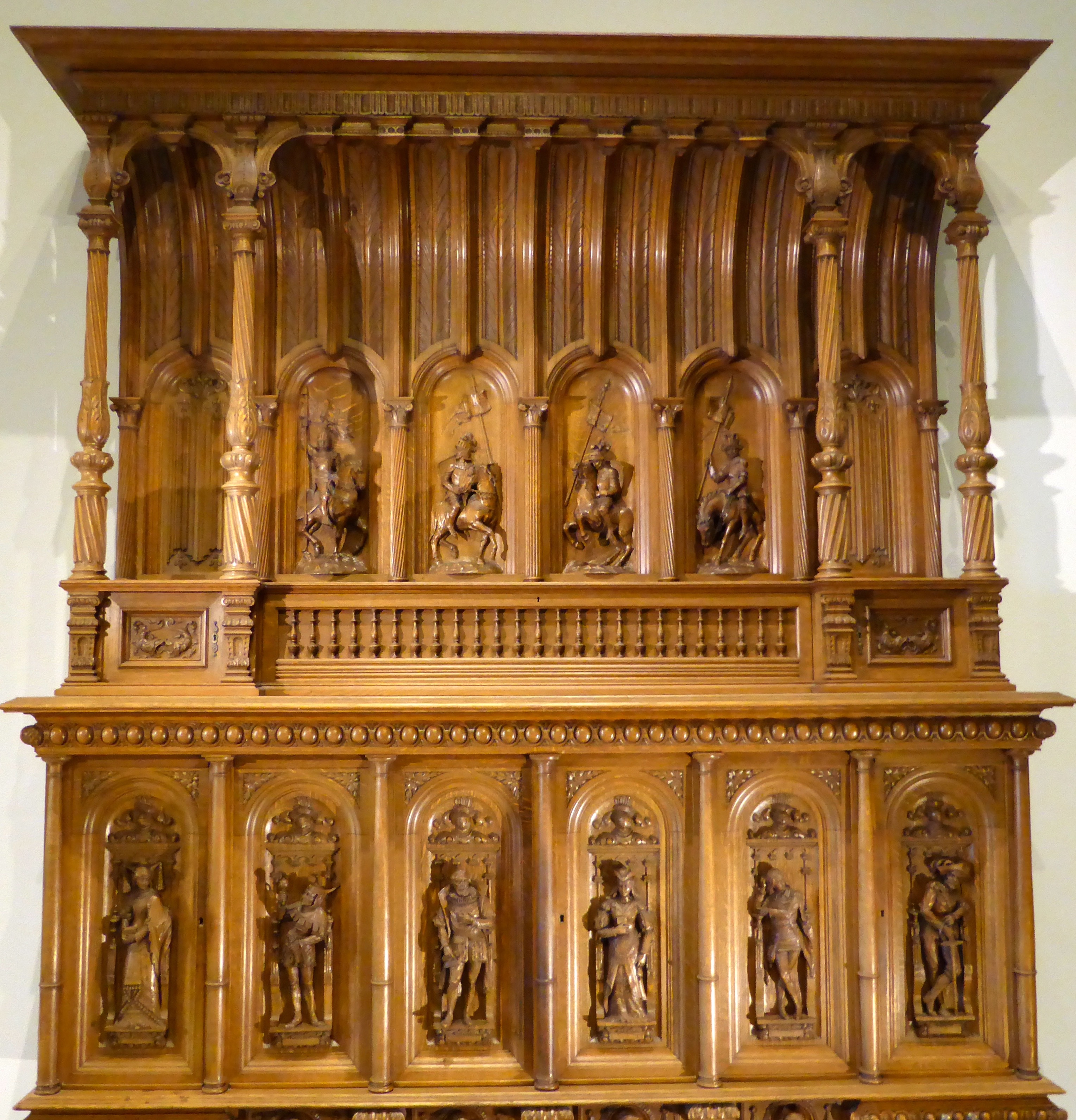 Prunkbuffet aus Eichenholz der Firma Heinr. Pallenberg, um 1900, Köln (MAK)